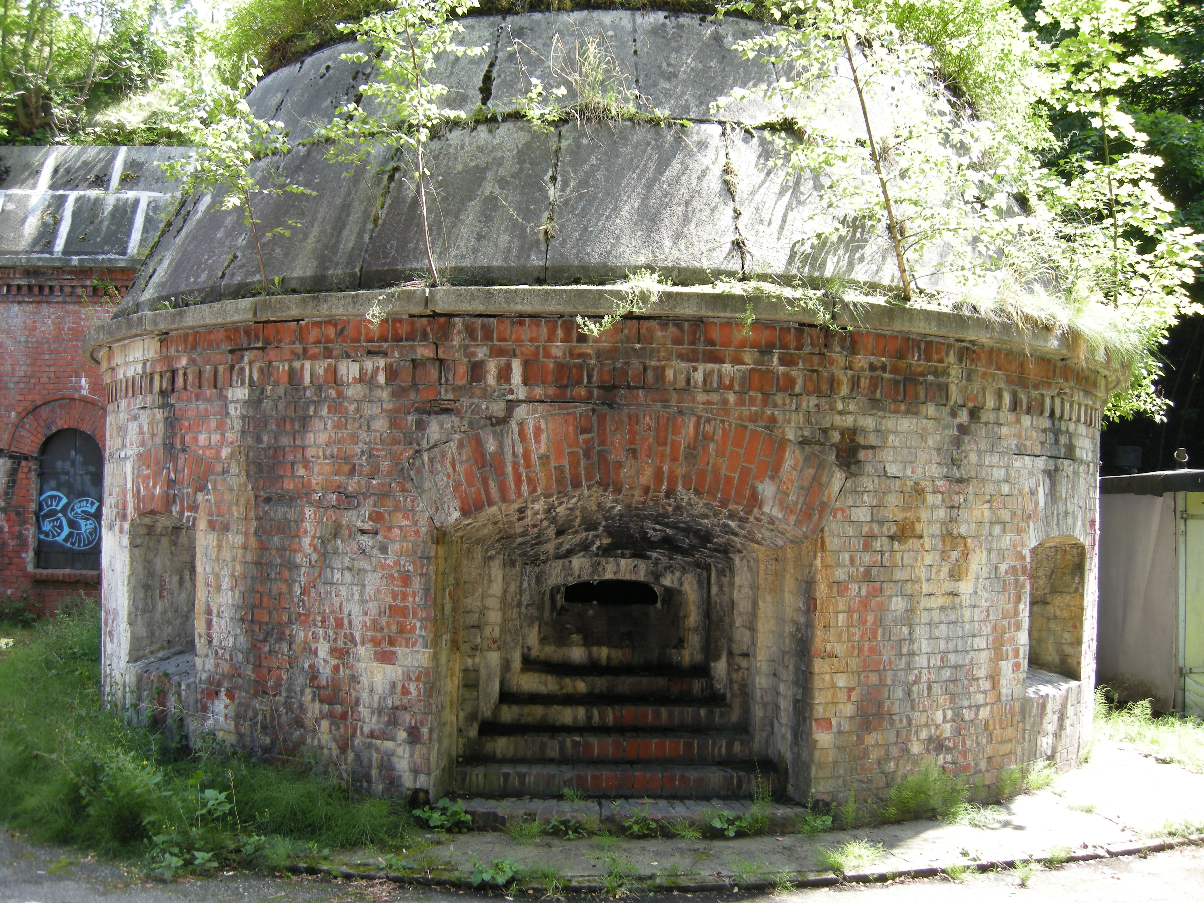 Twierdza Poznań Fort IIa (Thümen)